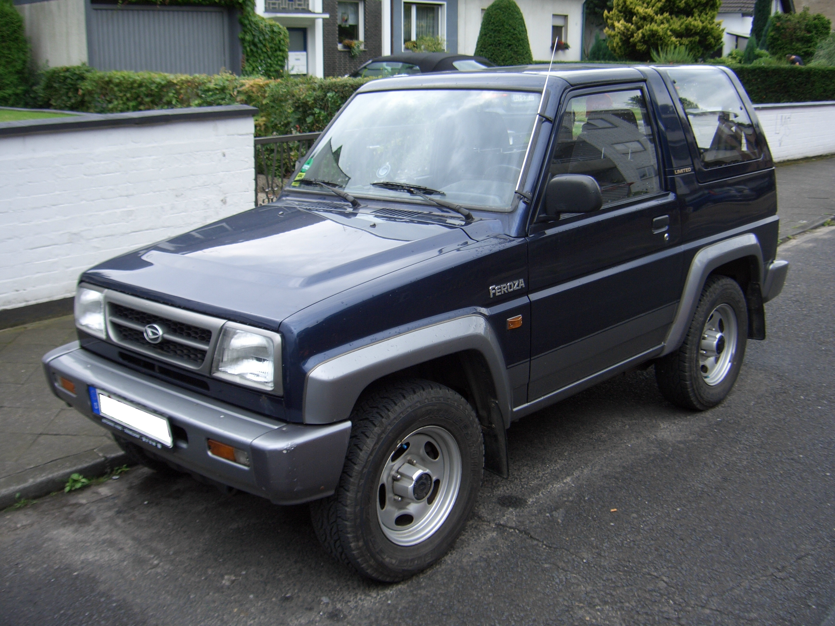 Daihatsu Feroza Limited (Facelift, 1994-1999)